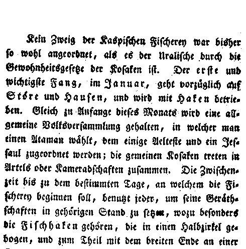 Scan einer Seite der Zeitschrift "Russland unter Alexander dem Ersten" von 1804, die Artels von Kosaken zum Störfang am Kaspischen Meer beschreibt.